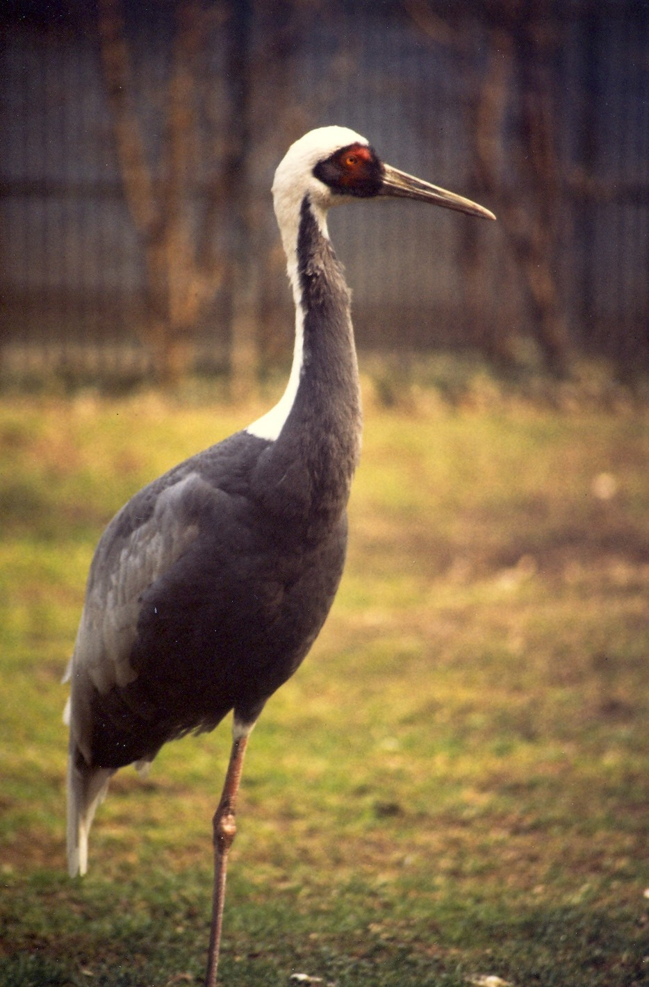 Grus vipio, Weißnackenkranich (Grus vipio; Zoo Ffm)